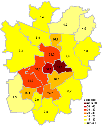 Bevölkerungsdichte in Braunschweig (Einwohnerzahl pro Hektar).